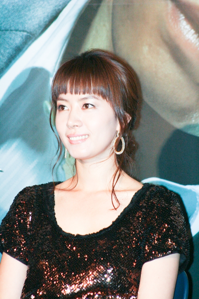 2007년 7월 26일 서울 용산 CGV에서 열린 영화 《리턴》 언론시사회에 참석한 배우 김유미.